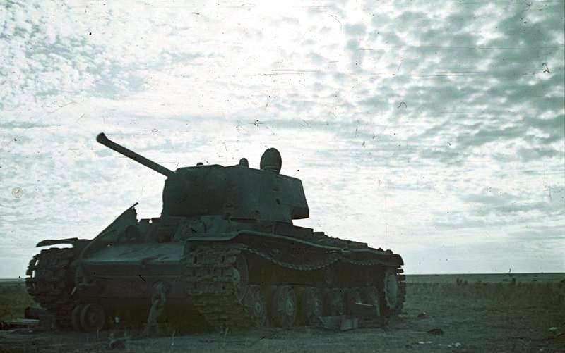 Bilder nach der Panzer-Schlacht vor Stalingrad im August 1942 in der Steppe vor der Stadt